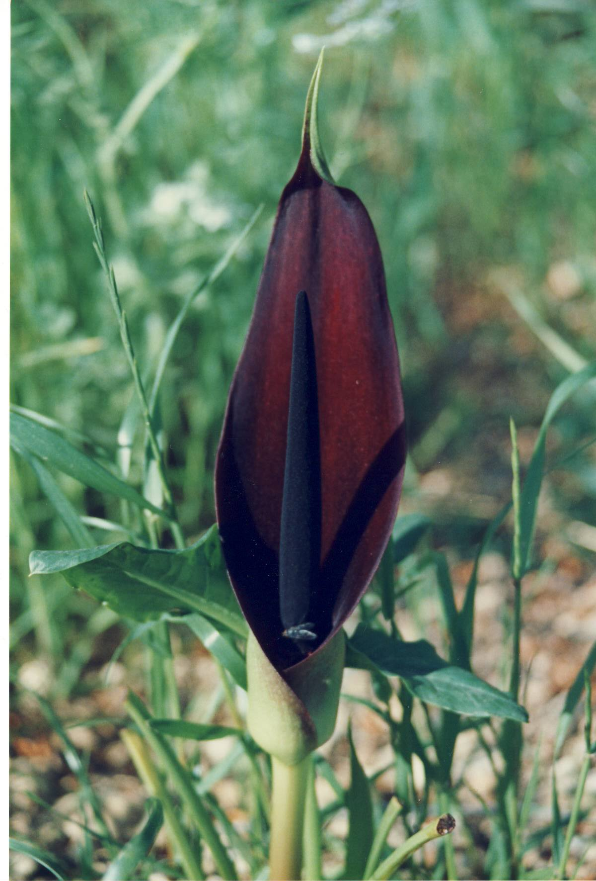 Arum palaestinum לוף ארץ-ישראלי